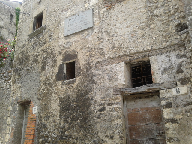 Casa natale di San Pietro Eremita